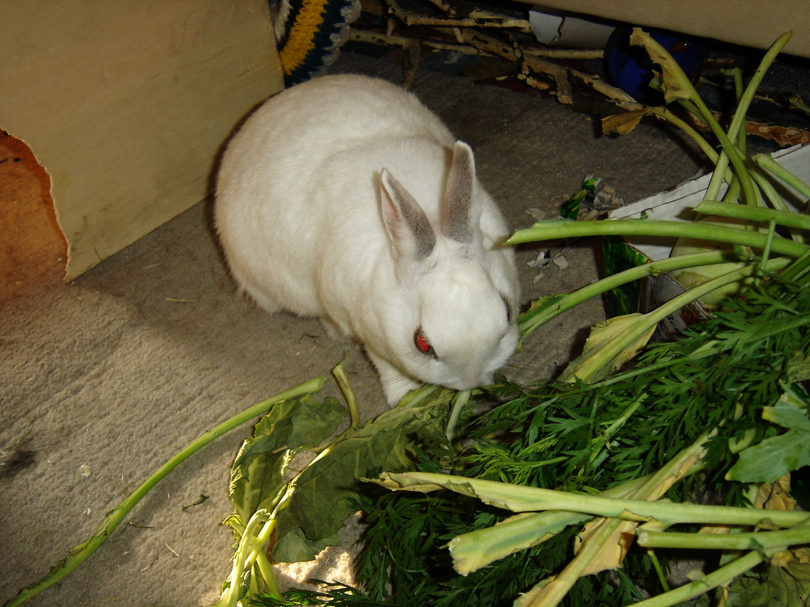 Zwergkaninchen Shabana bei der Nahrungsaufnahme, minimal nachbearbeitet mit The Gimp